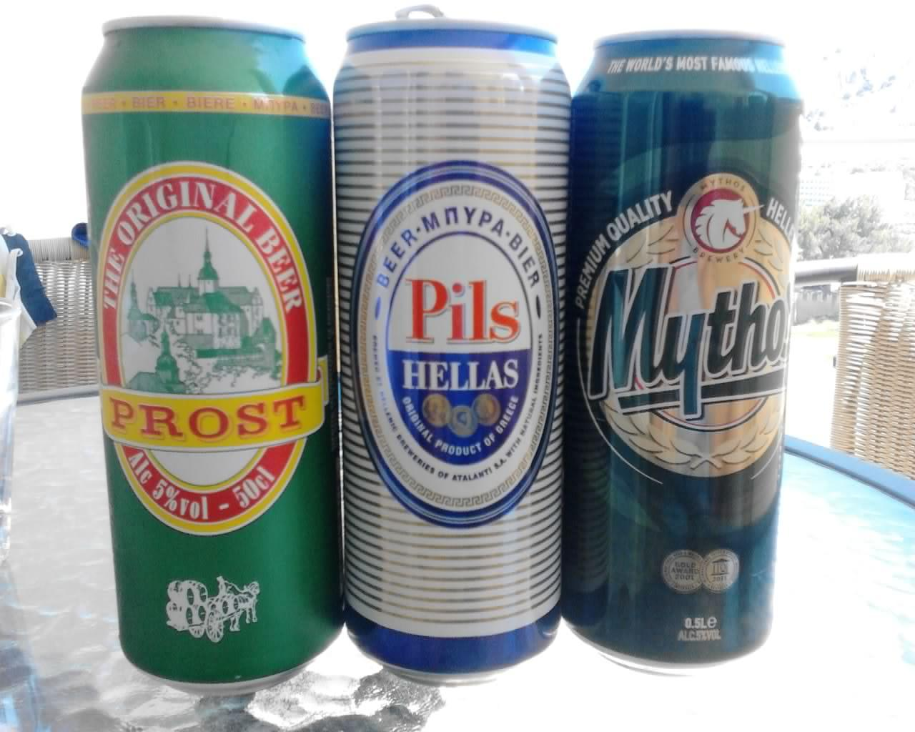 Three Greek Beers